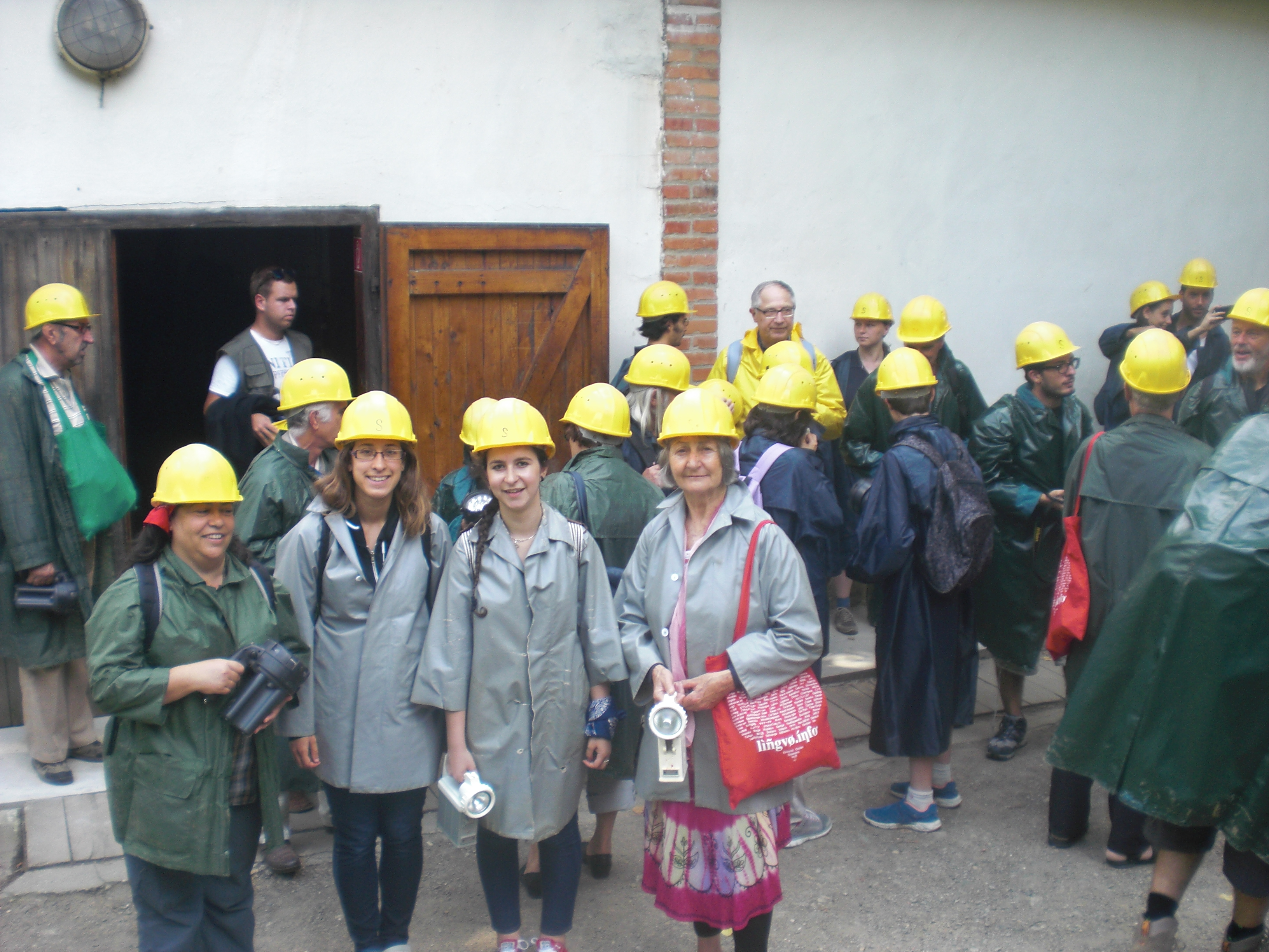 Enminigotaj kongresanoj